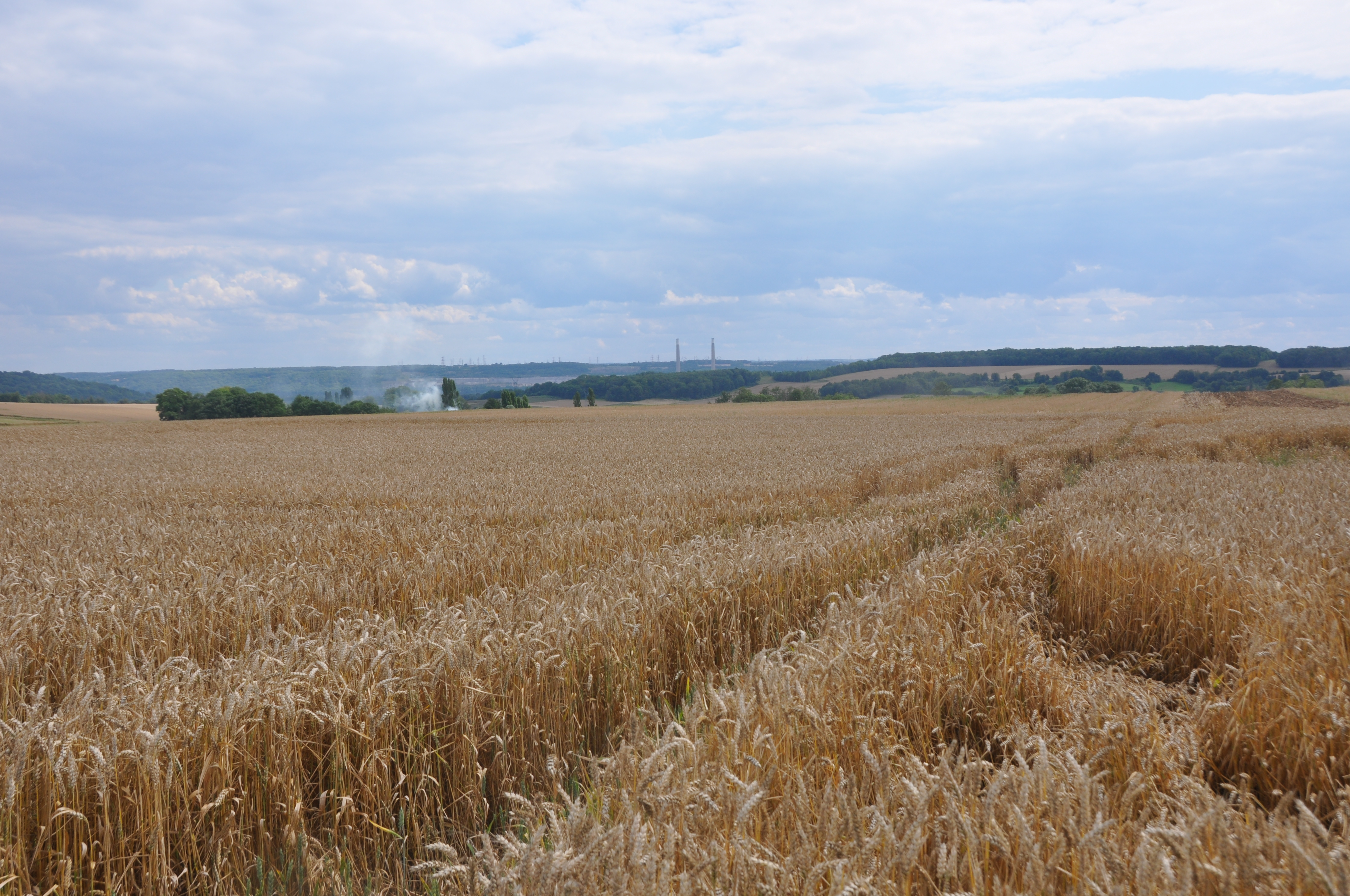 Panorama de champs de blé à Fontenay-Saint-Père. On peut distinguer en arrière plan la Seine et la centrale thermique de Porcheville.